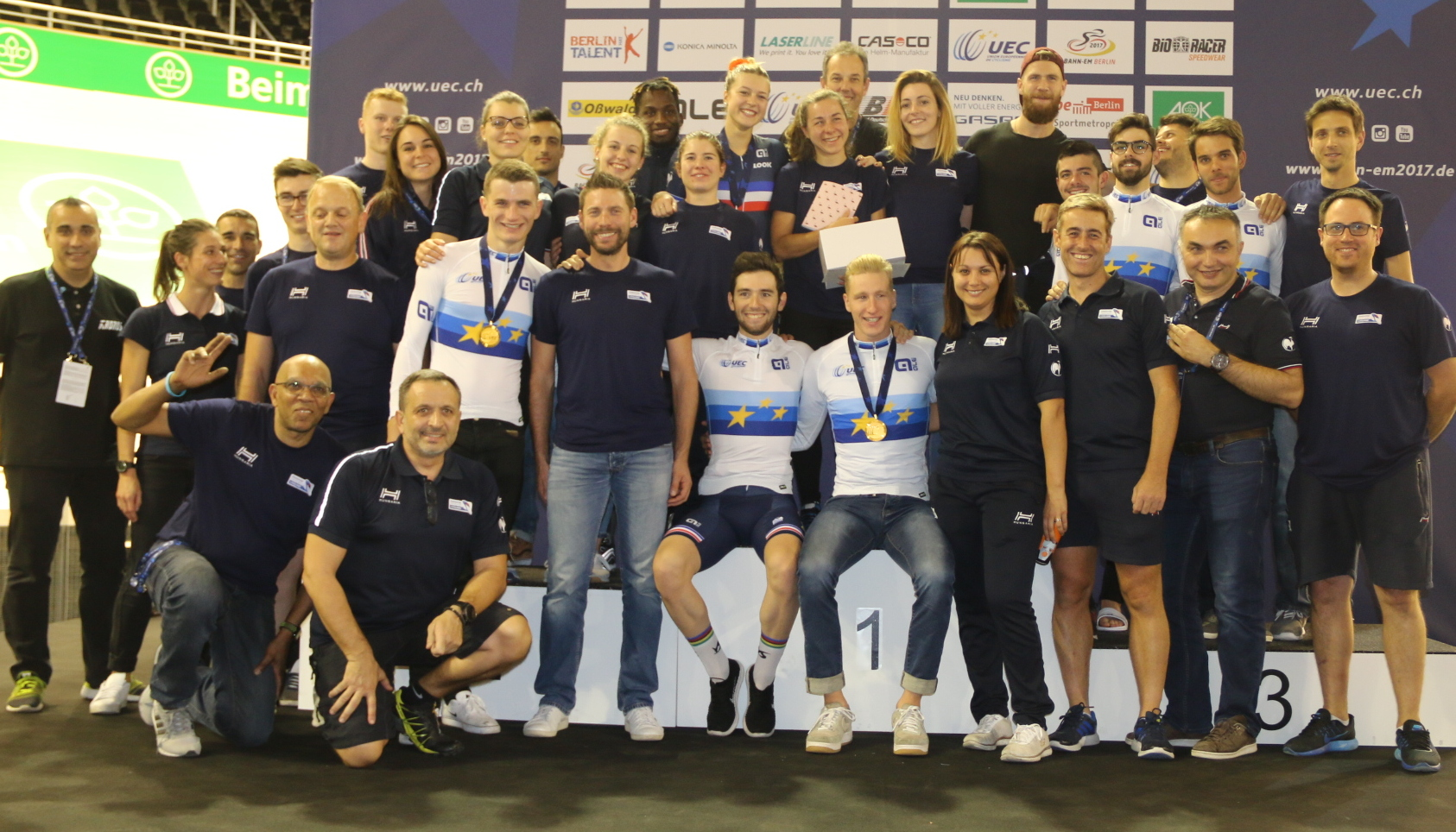 Franz. Mannschaft bei der EM